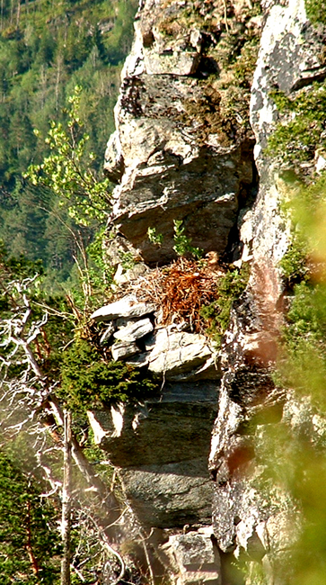 Fuglereir, Kongeørn.